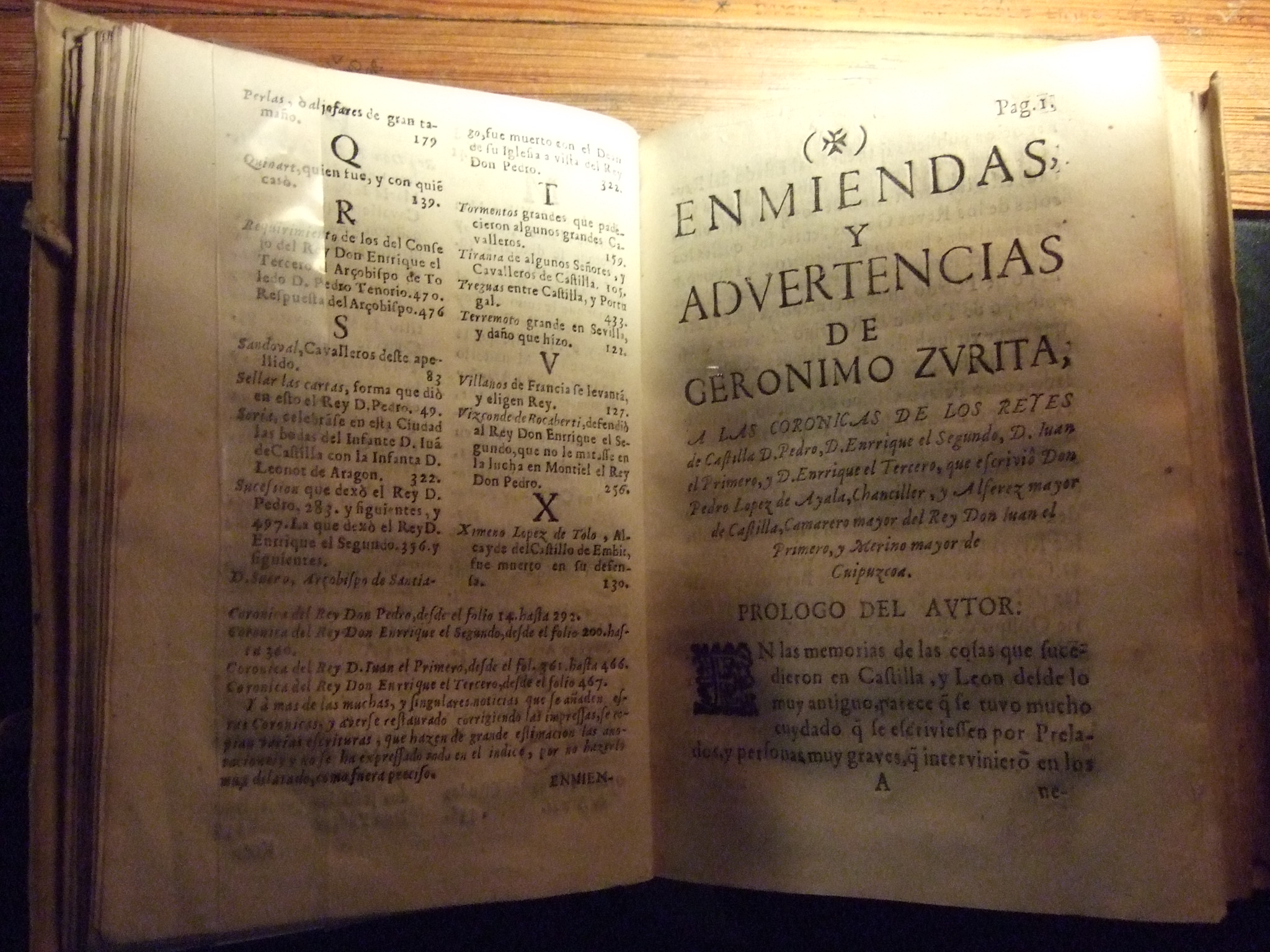 Zurita, Jerónimo (1512-1580) Enmiendas y advertencias a las coronicas de los Reyes de Castilla, D. Pedro, D. Enrique el Segundo, D. Iuan el Primero y D. Enrique el Tercero que escrivio Don Pedro Lopez de Ayala ... / compuestas por Geronimo Zurita ... [1] En Zaragoça : por los herederos de Diego Dormer, 1683